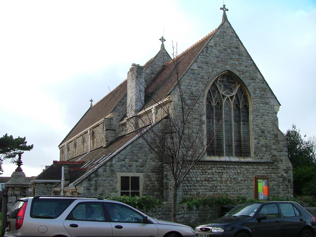 Westgate Church